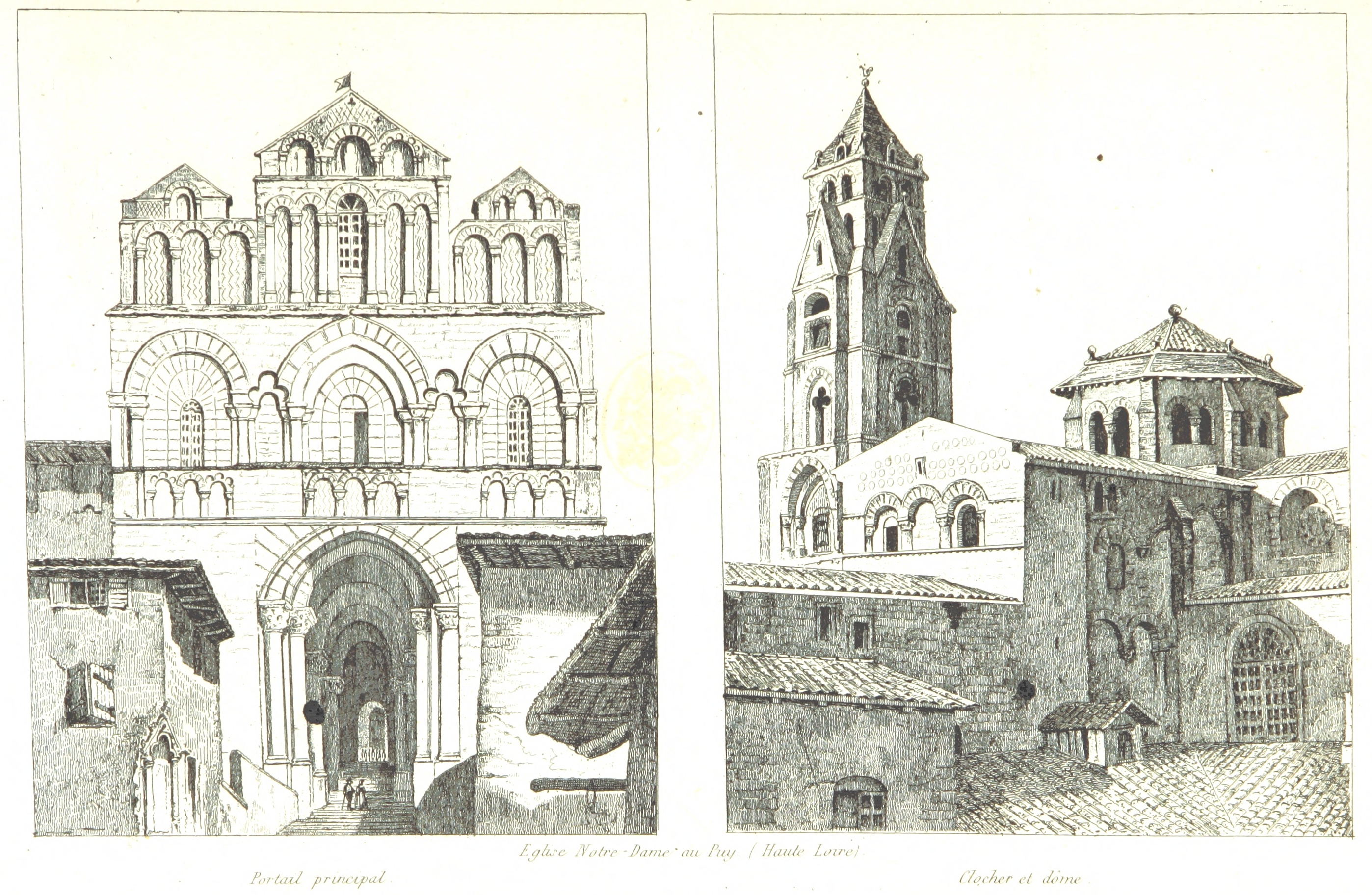 Façade et toiture de la cathédrale du Puy en 1836: gravure tirée de la "France historique et monumentale" de Jean-Abel Hugo